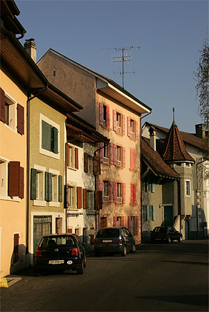 Payerne: Rue des Moulins